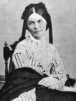 Екатерина Алексеевна Щербатова (1818-1869), дочь А.Г.Щербатова и С.С.Апраксиной, была замужем за Ил.Ил.Васильчиковым (1805-1862).